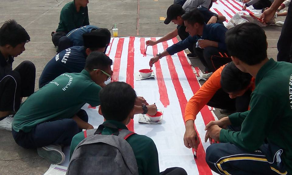 Mewarna Jalur Gemilang 3